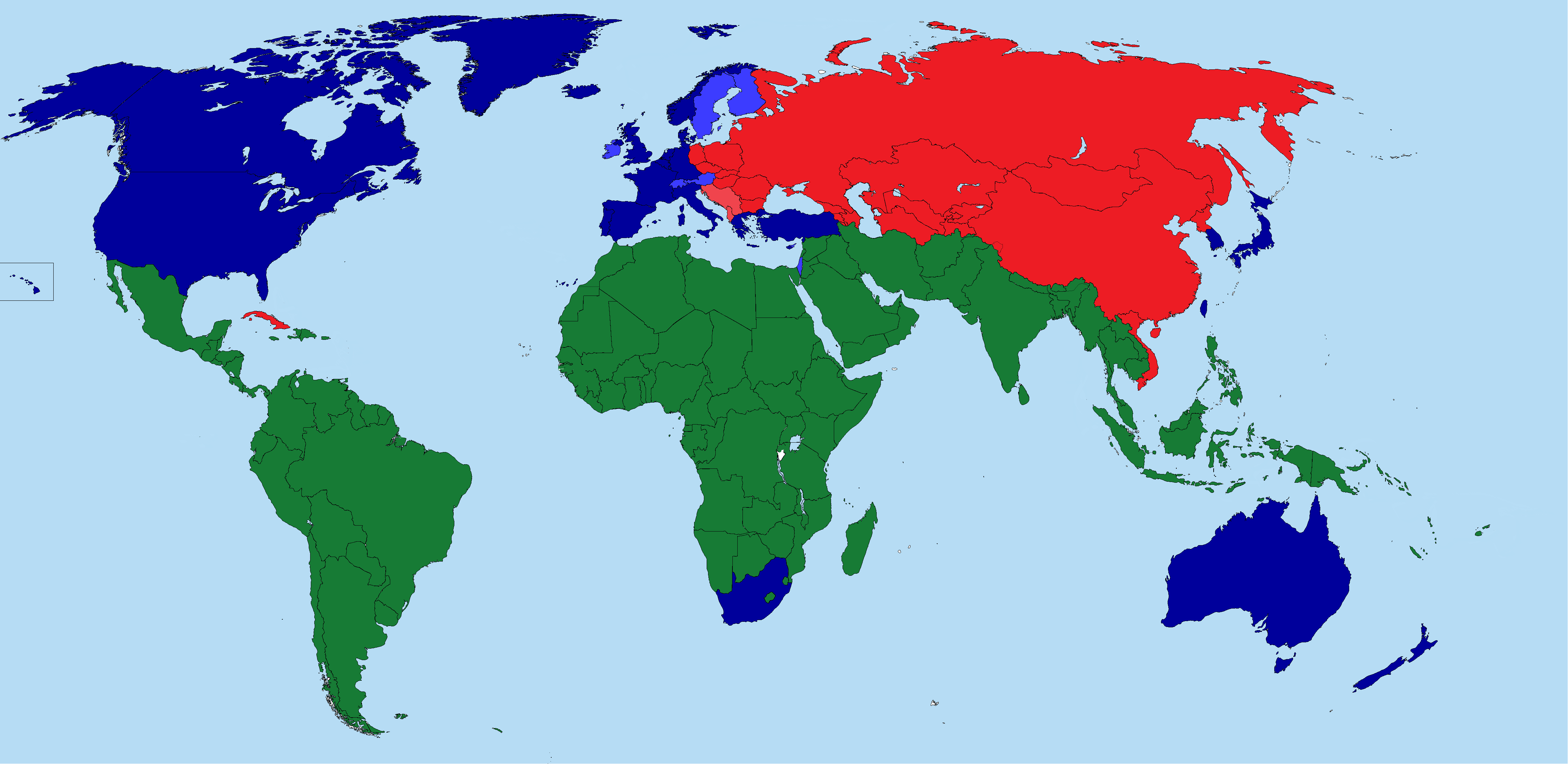 Batı ve Doğu Paktı.